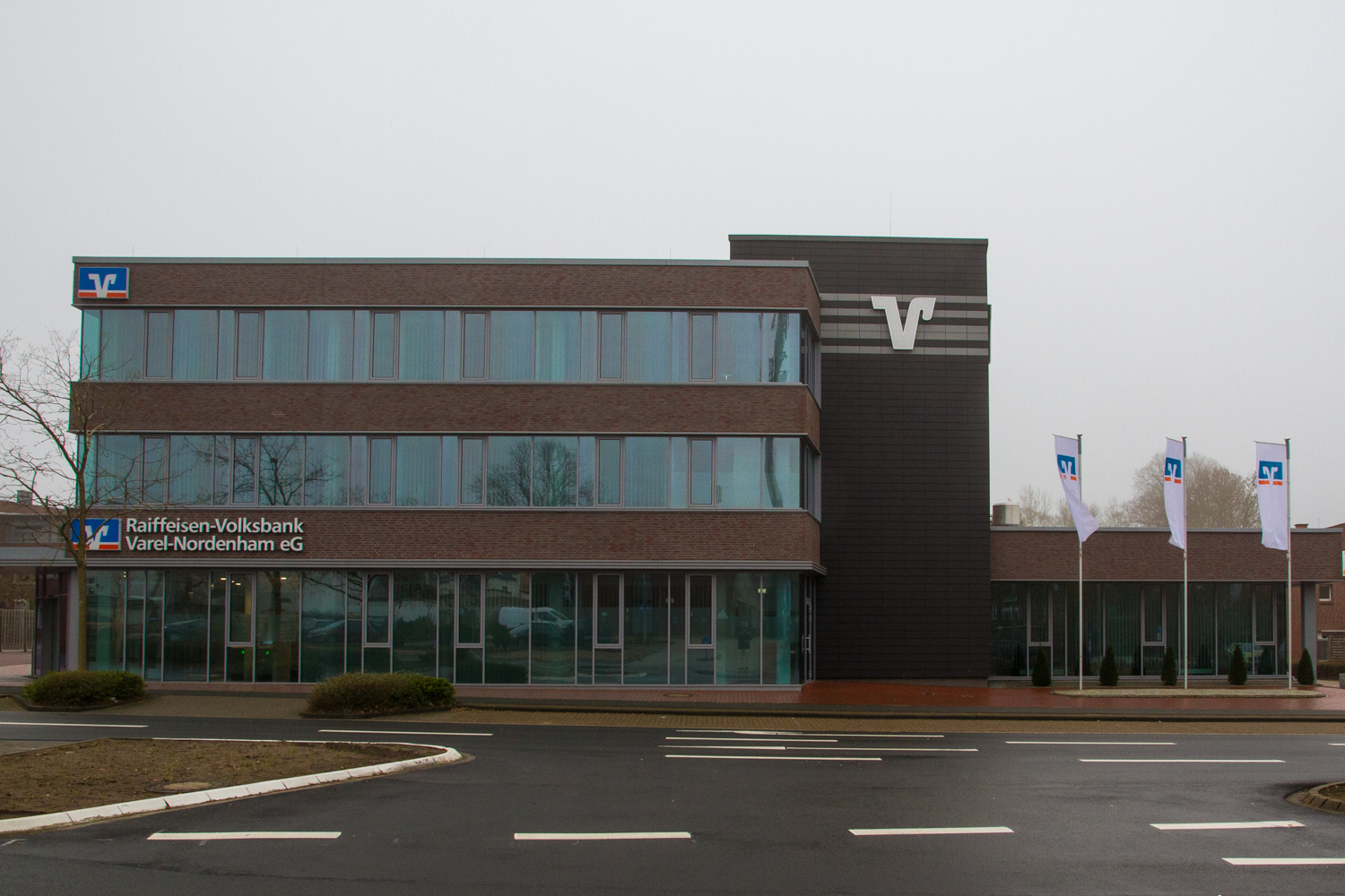 Das Hauptgebäude der Raiffeisen-Volksbank Varel-Nordenham liegt in Varel an der Bürgermeister-Heidenreich-Straße